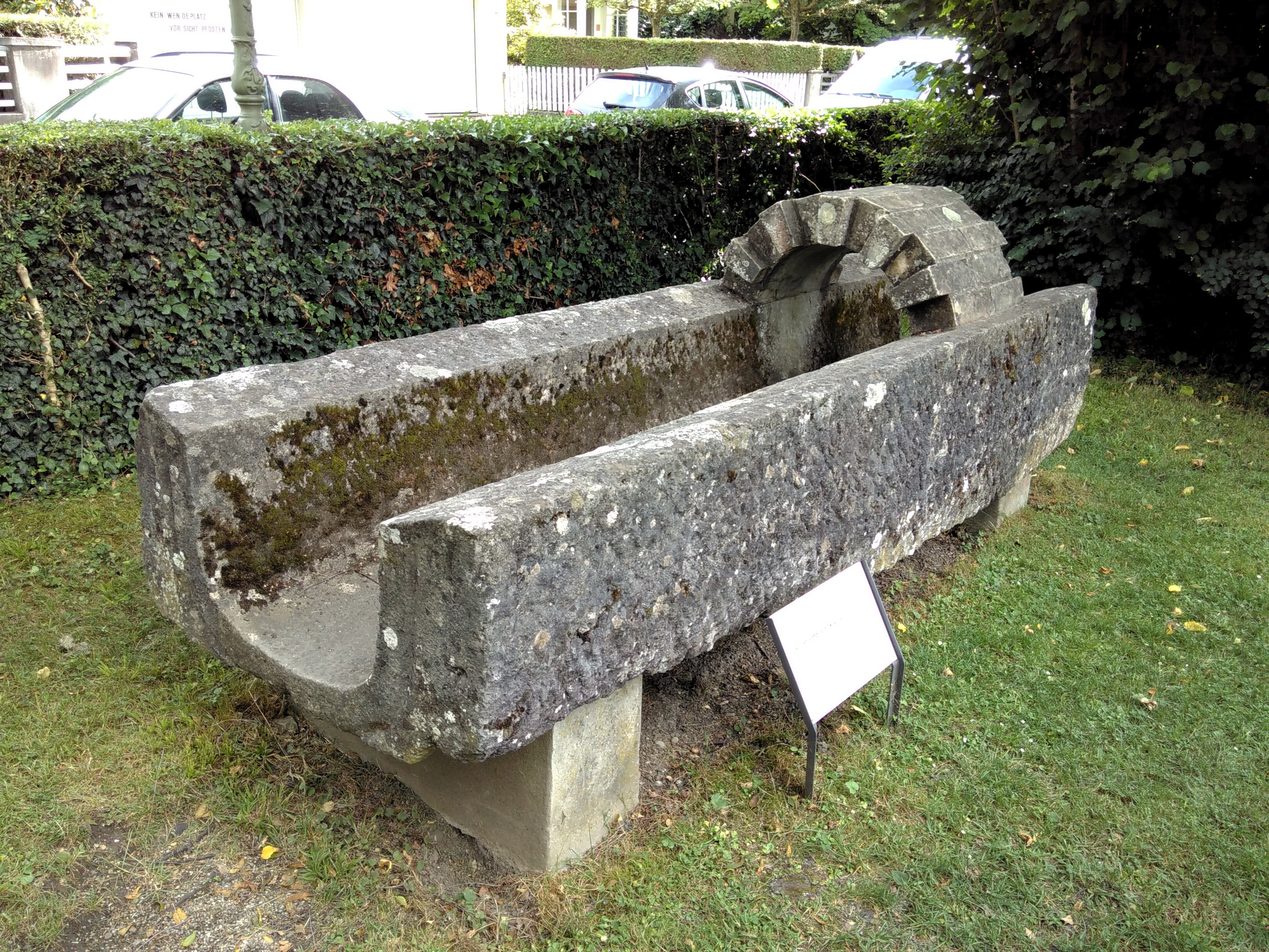 Ein Teil des ehemaligen Stadtbachkanals in Lindengutpark. Gemäss Schild besteht der Kanal aus Würenloser Kalk mit Backsteingewölbe.